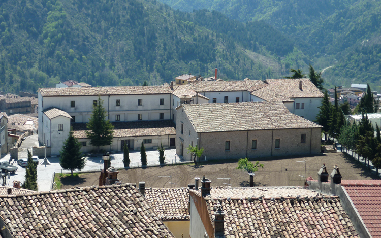 San Giovanni in Fiore - Convento dei Padri Cappuccini - Panorama